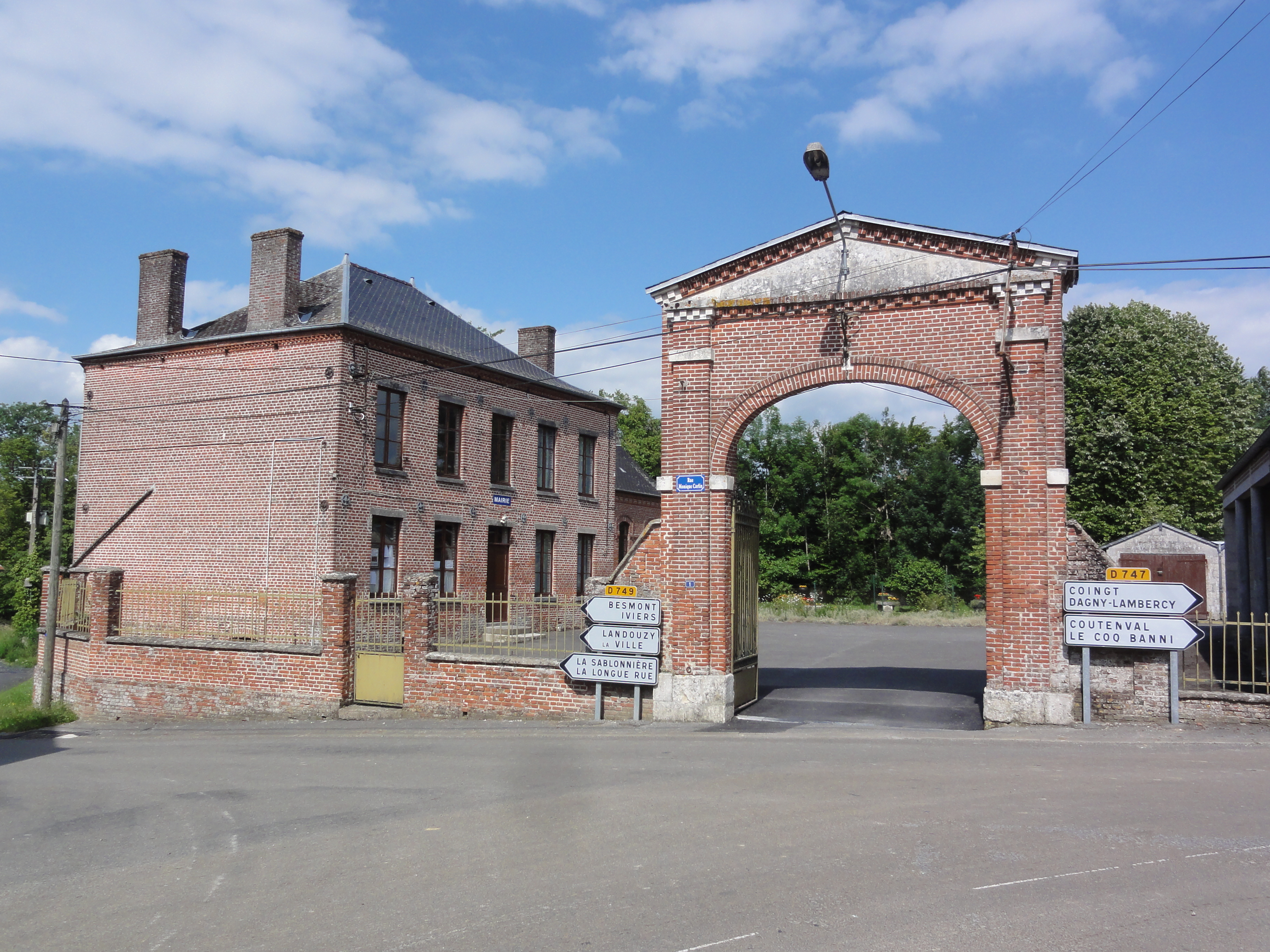 Jeantes (Aisne) mairie